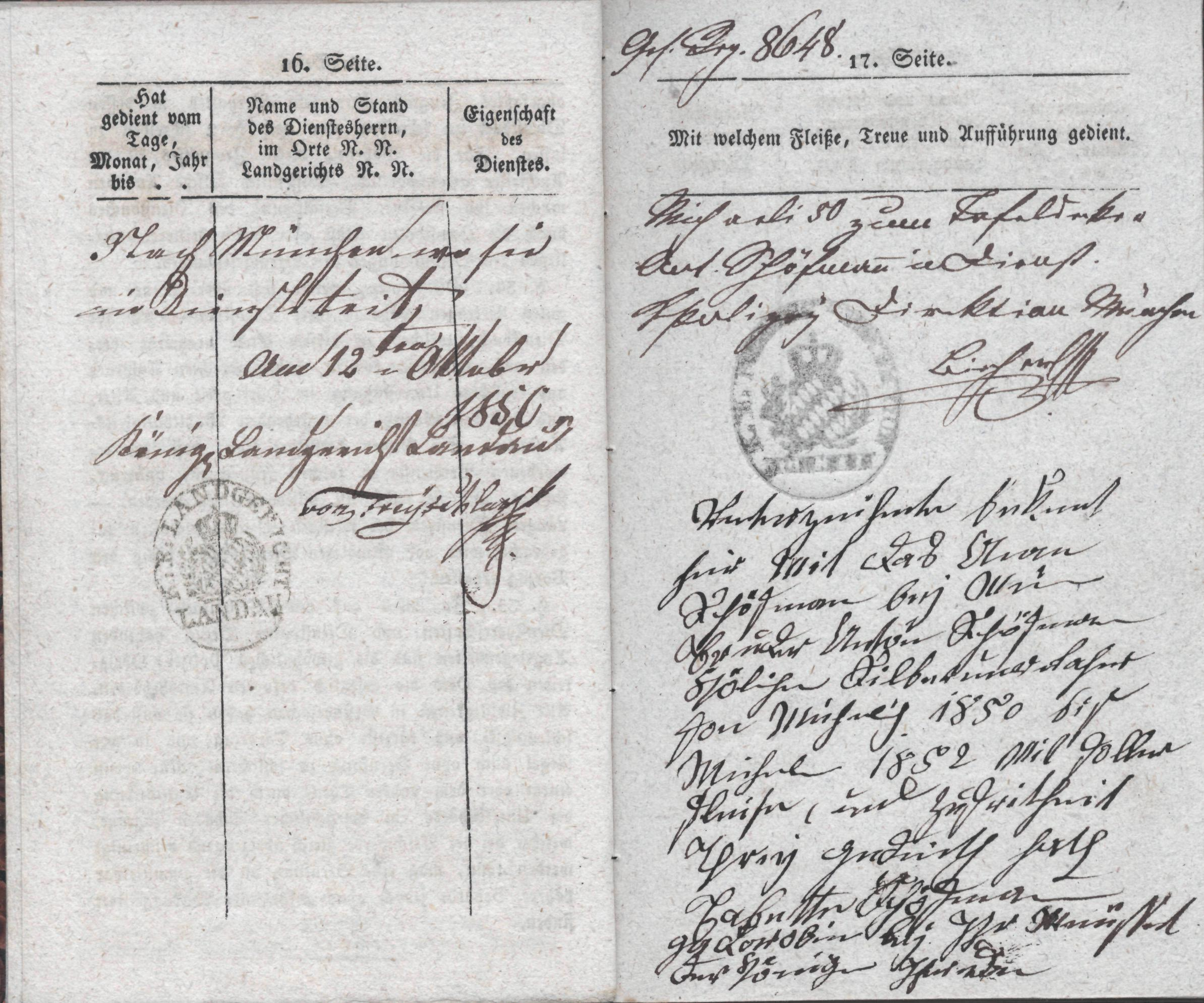 de: Dies ist ein Scan des Dokuments: en: This is a scan of the historical document: Dienstbotenbuch, Formularbuch gedruckt Straubing 1846, benutzt 1850–1852 für die Dienstbotin Anna Schöfmann aus Landau (Pfalz), mit einer einzigen Diensteintragung